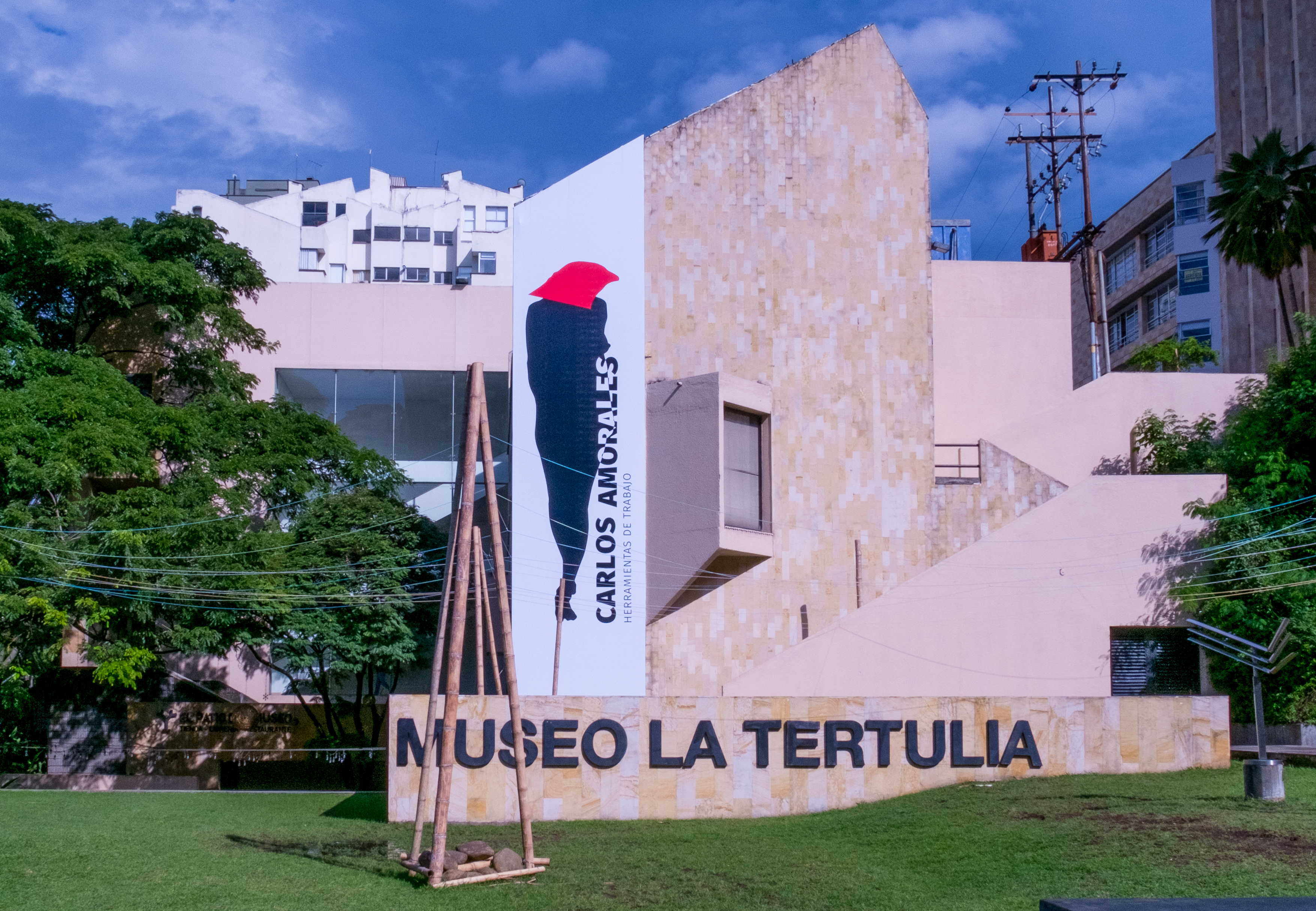 Museo la Tertulia